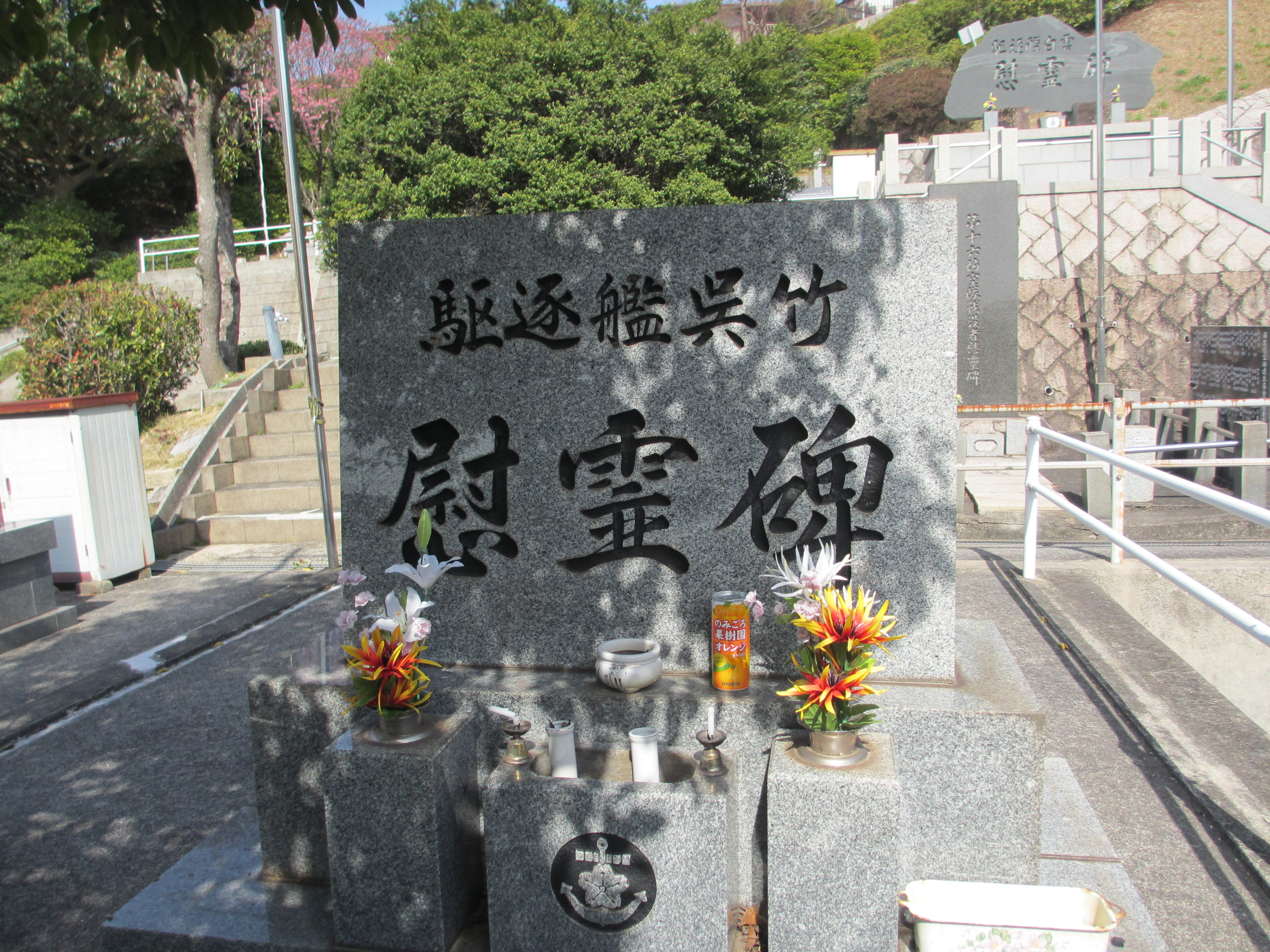 呉市上長迫町旧海軍墓地、右奥第十六防空隊戦没者慰霊碑